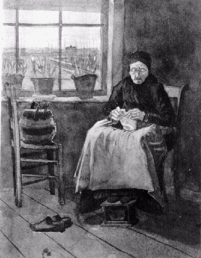 Pintura estancia en La Haya